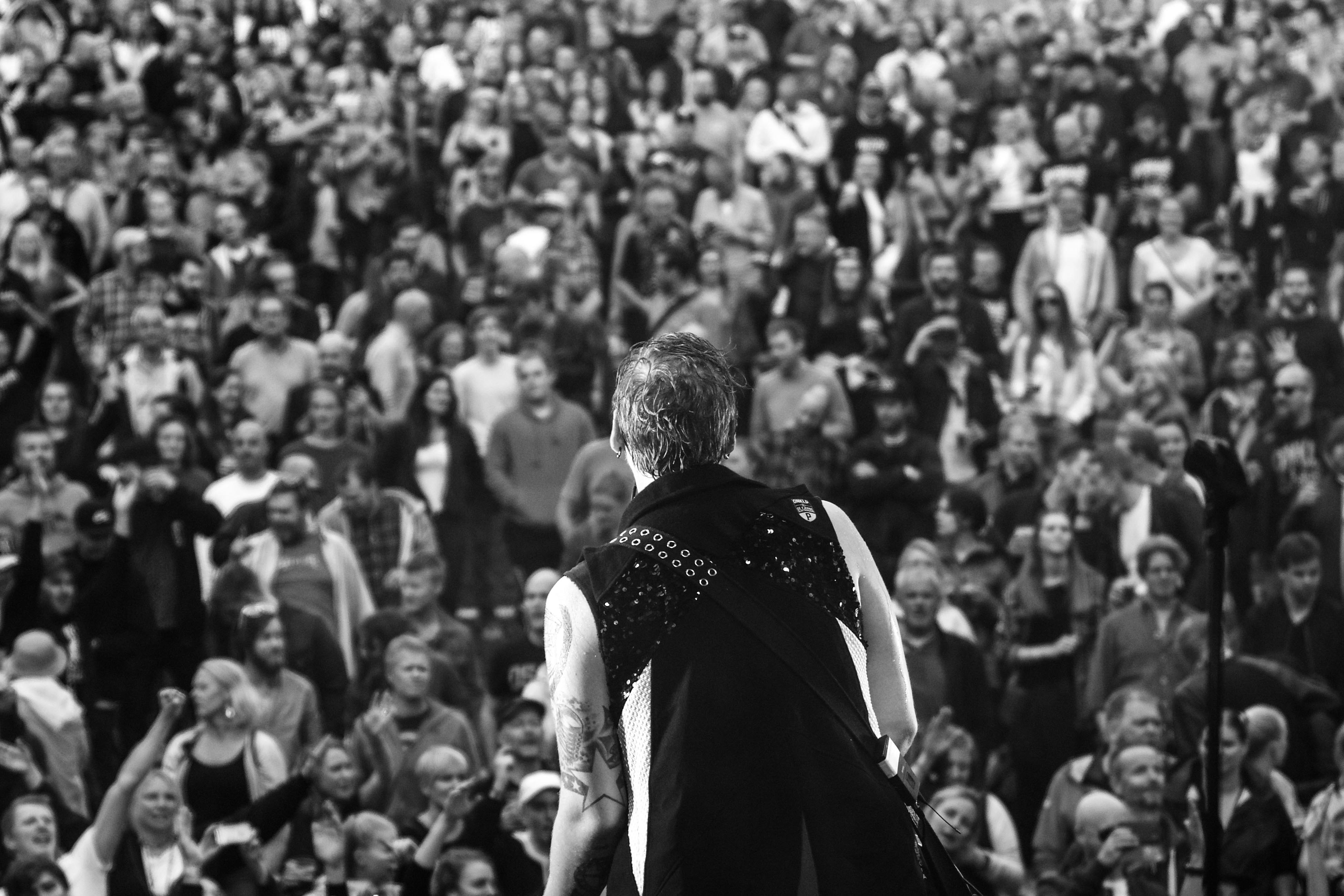 Johan Larsson på Norwegian Wood 2017